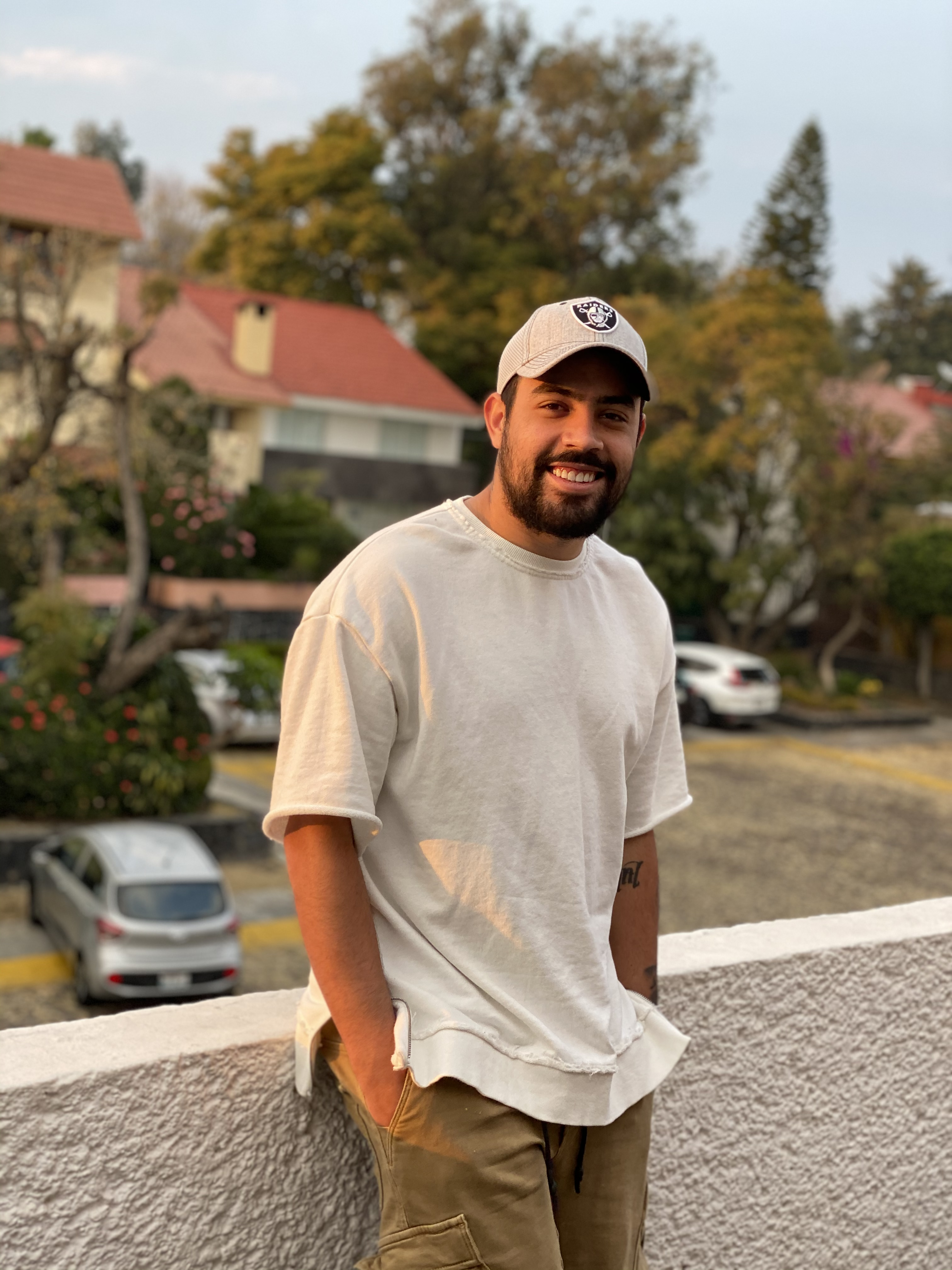 Junior Carabaño